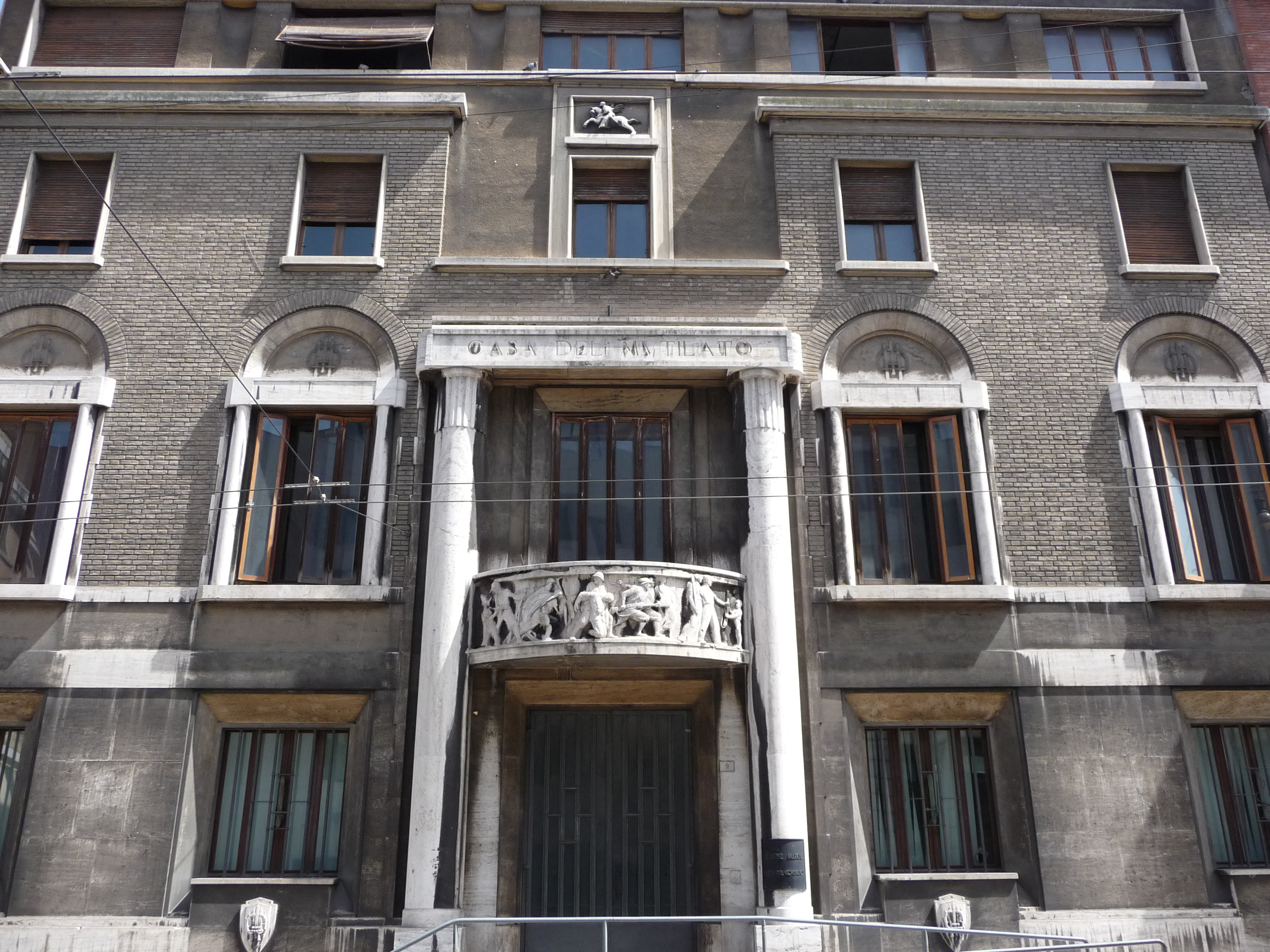 Palazzo del Mutilato ad Ancona. Opera dell'arch. Eusebio Petetti